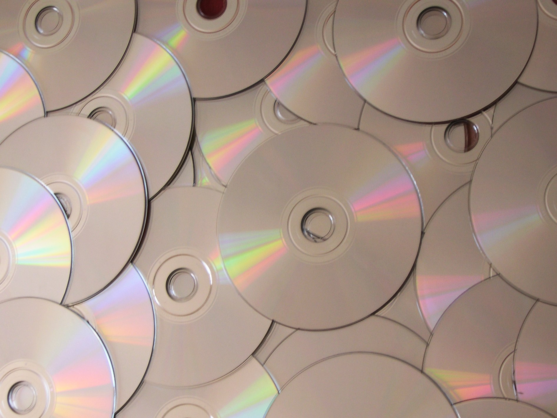 Photo prise le 01/10/06. Je suis l'auteur de la photo. Nicosmos